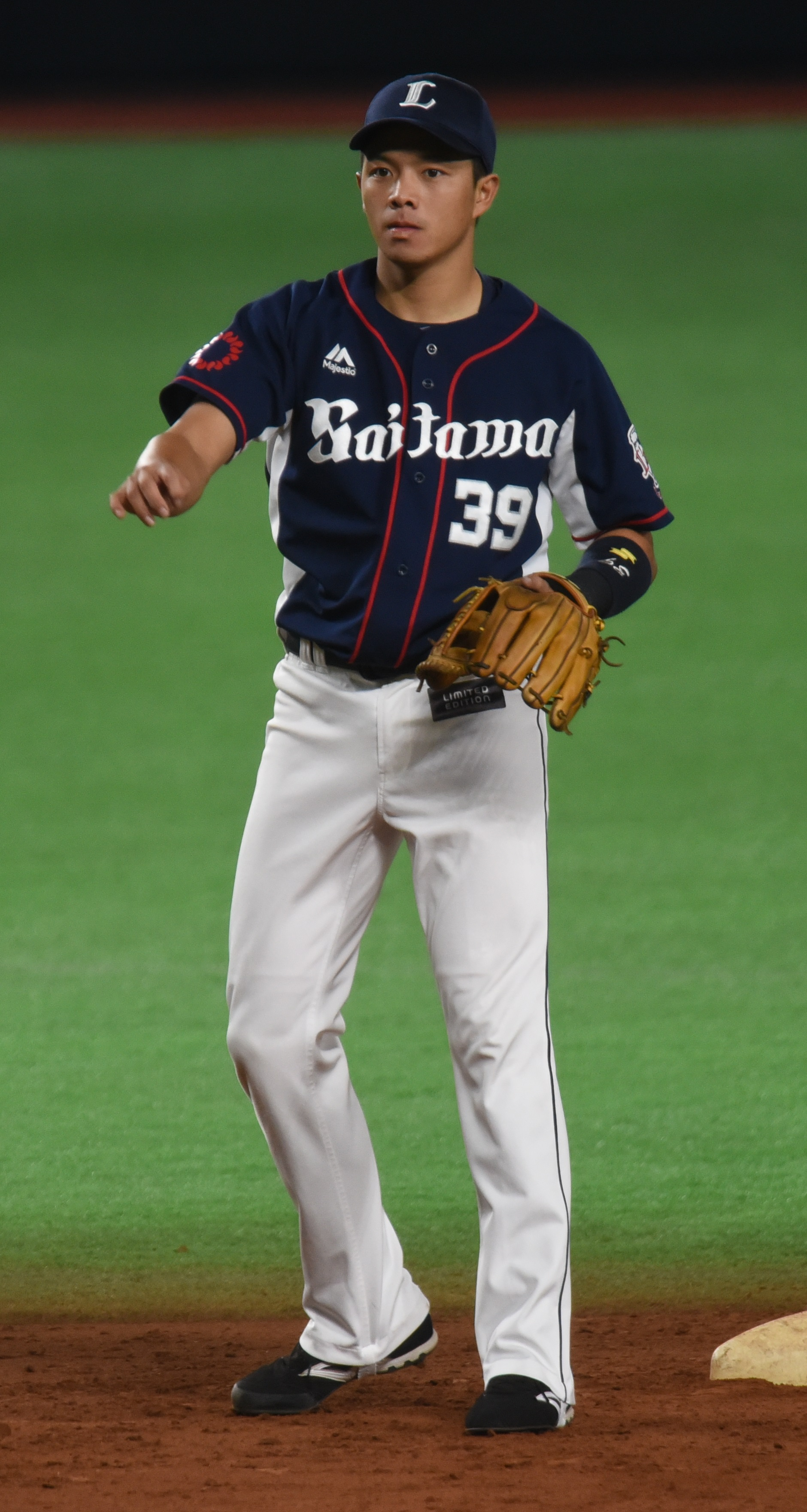 埼玉西武ライオンズの呉念庭内野手。2016年9月11日、福岡ヤフオク!ドームにて。